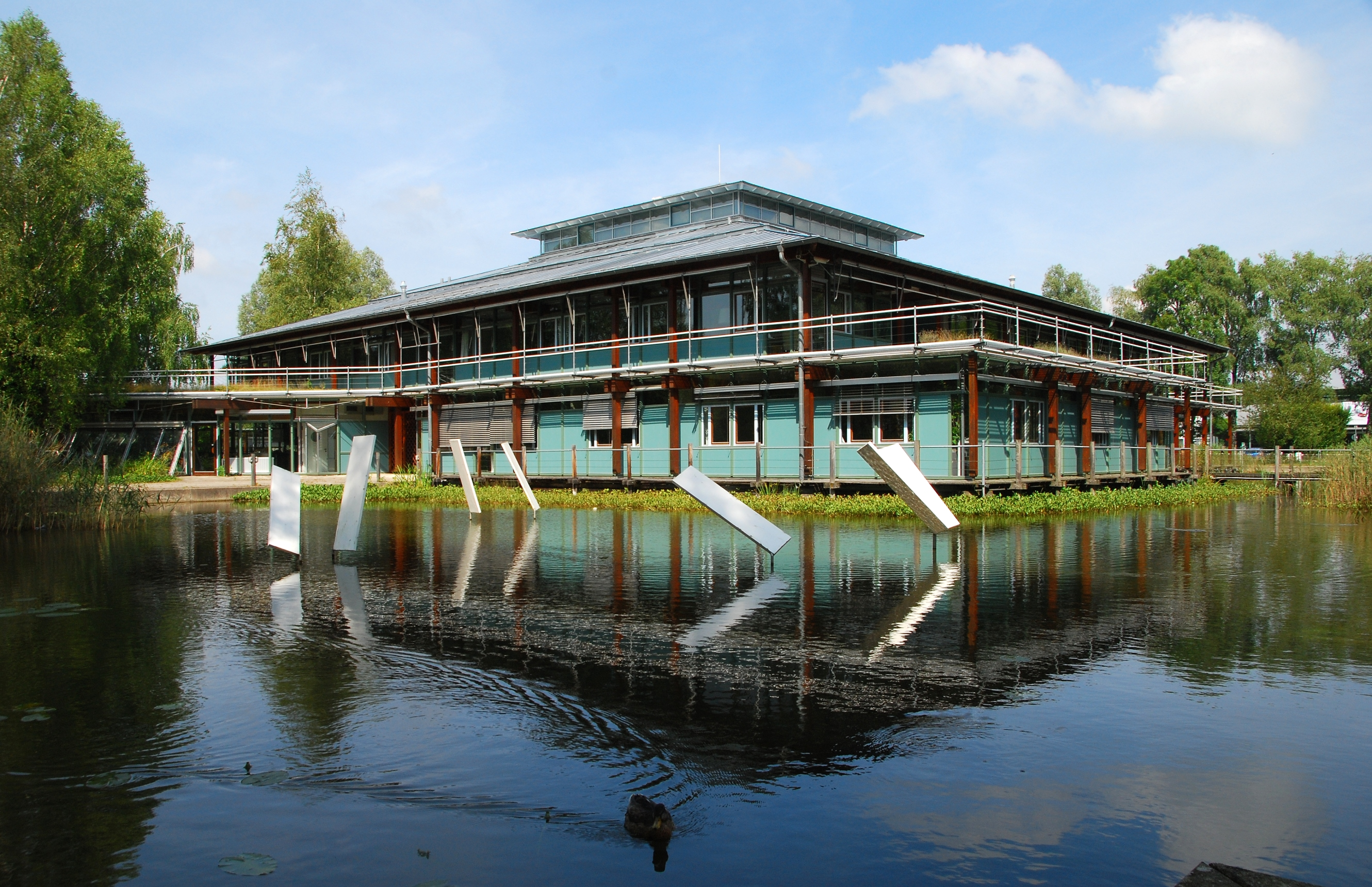 Das Landratsamt des Landkreises Starnberg wurde 1986/87 von dem Architektenteam Auer+Weber erbaut. 1989 wurde das Gebäude, das seine Funktionalität mit Ästhetik verbindet, mit dem Deutschen Architekturpreis ausgezeichnet.